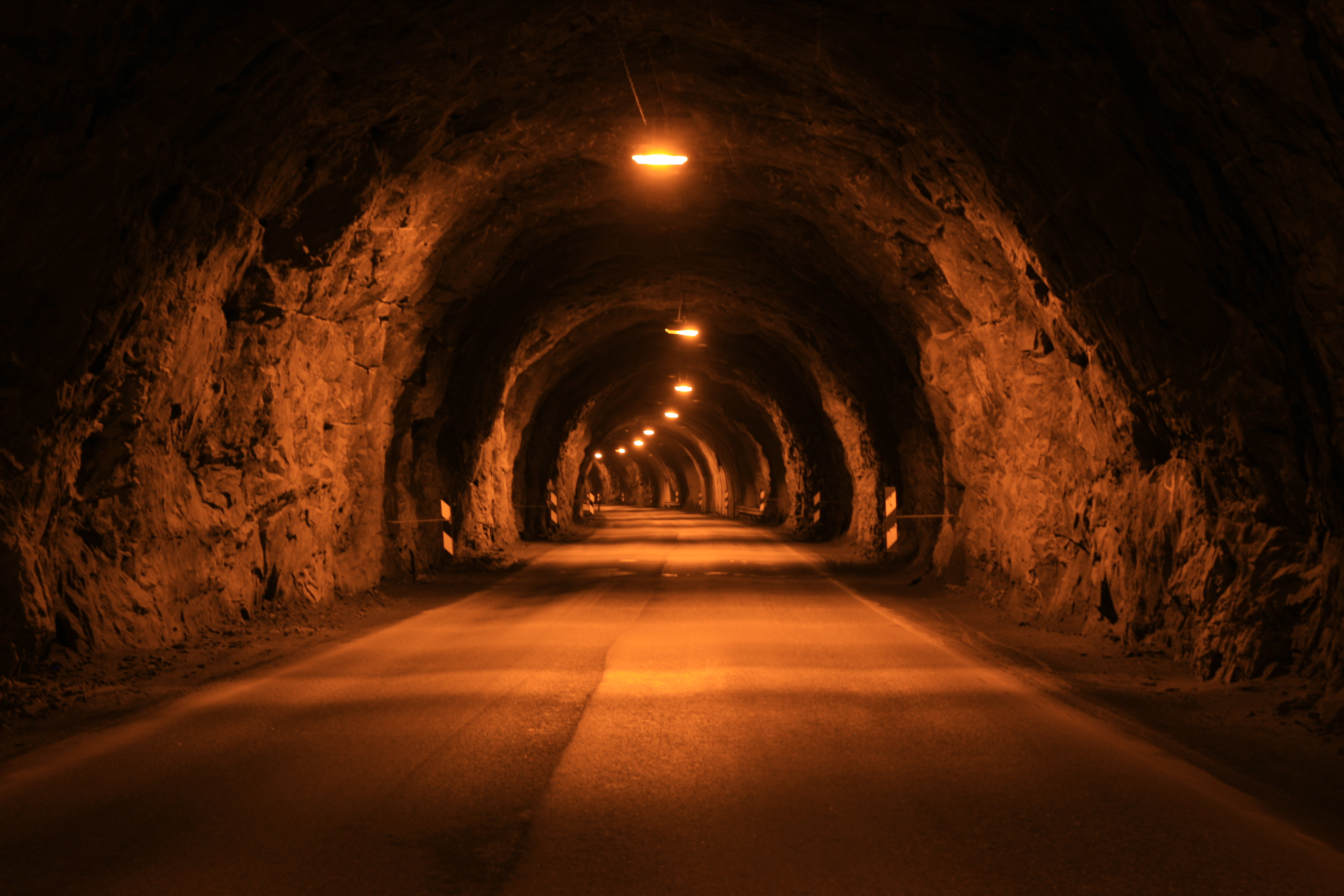 Inne i tunnelen.